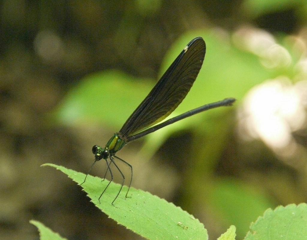 Matrona basilaris japonica：リュウキュウハグロトンボ・♀ 2009/08/09 沖縄本島北部：Okinawa Island, Japan